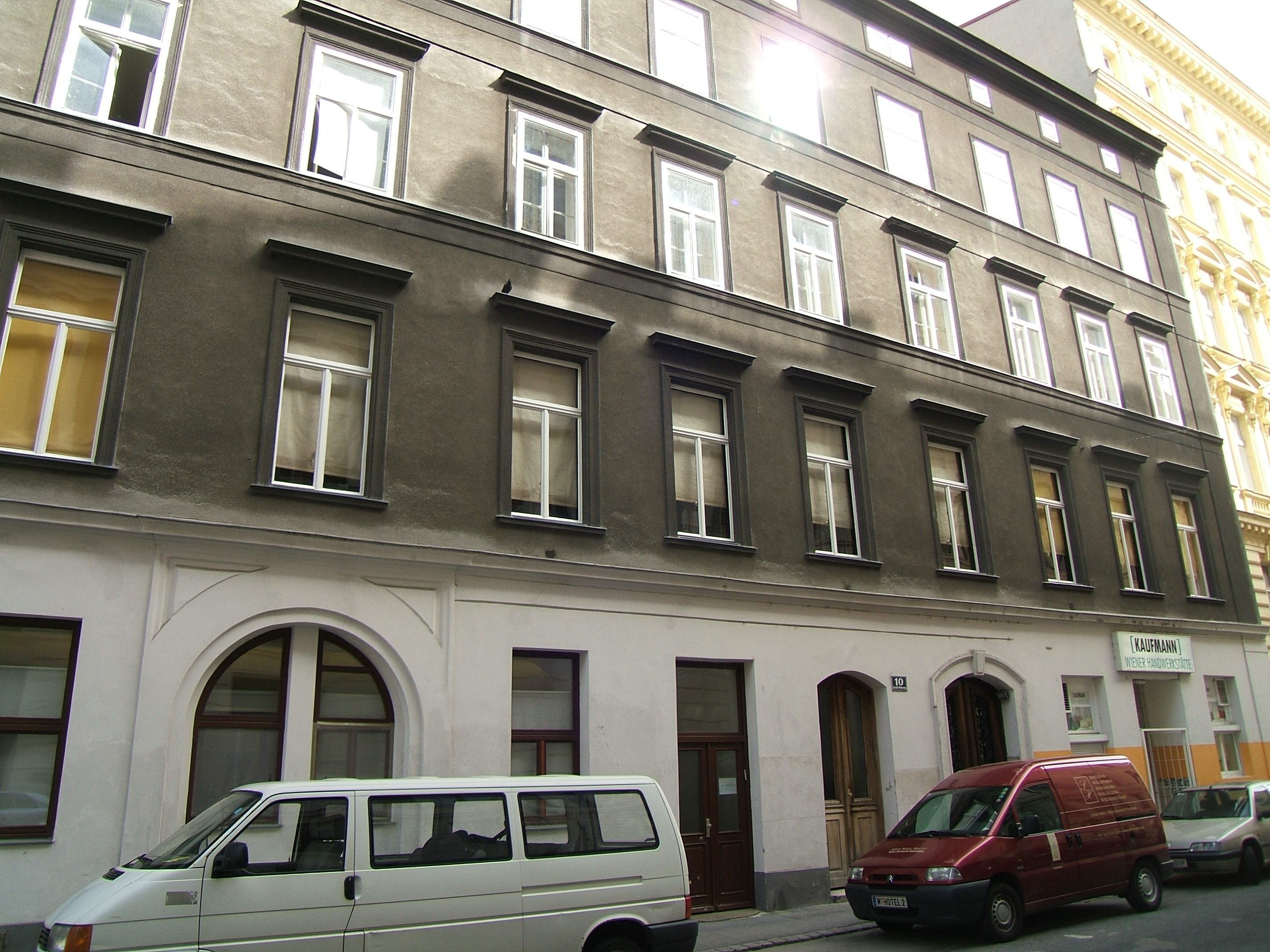 Palace Bellegarde in Vienna 2nd district, view from Große Mohrengasse 10